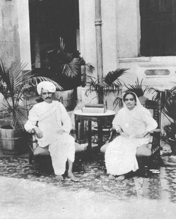 Gandhi and Kasturba in 1915.